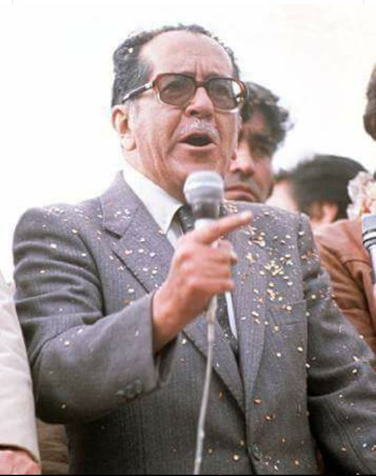 Presidente constitucional de Bolivia en dos mandatos